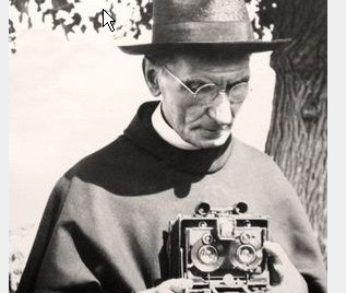 Stanko Dujmović